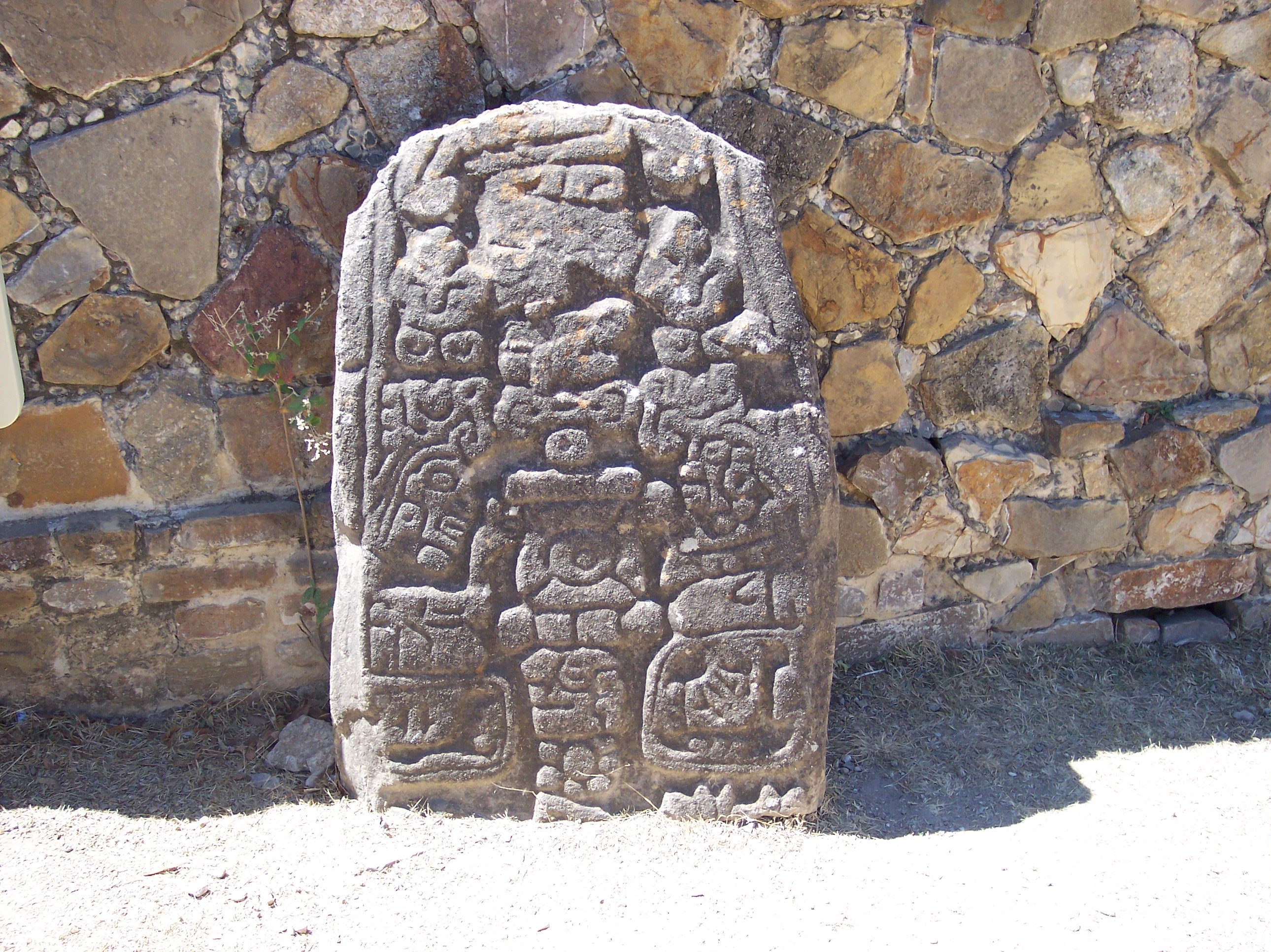 Photo taken in Monte Alban, State of Oaxaca, Mexico. NOTE: Photo nead to be describe. SPANISH: Foto tomada en Monte Albán, Estado de Oaxaca, México.